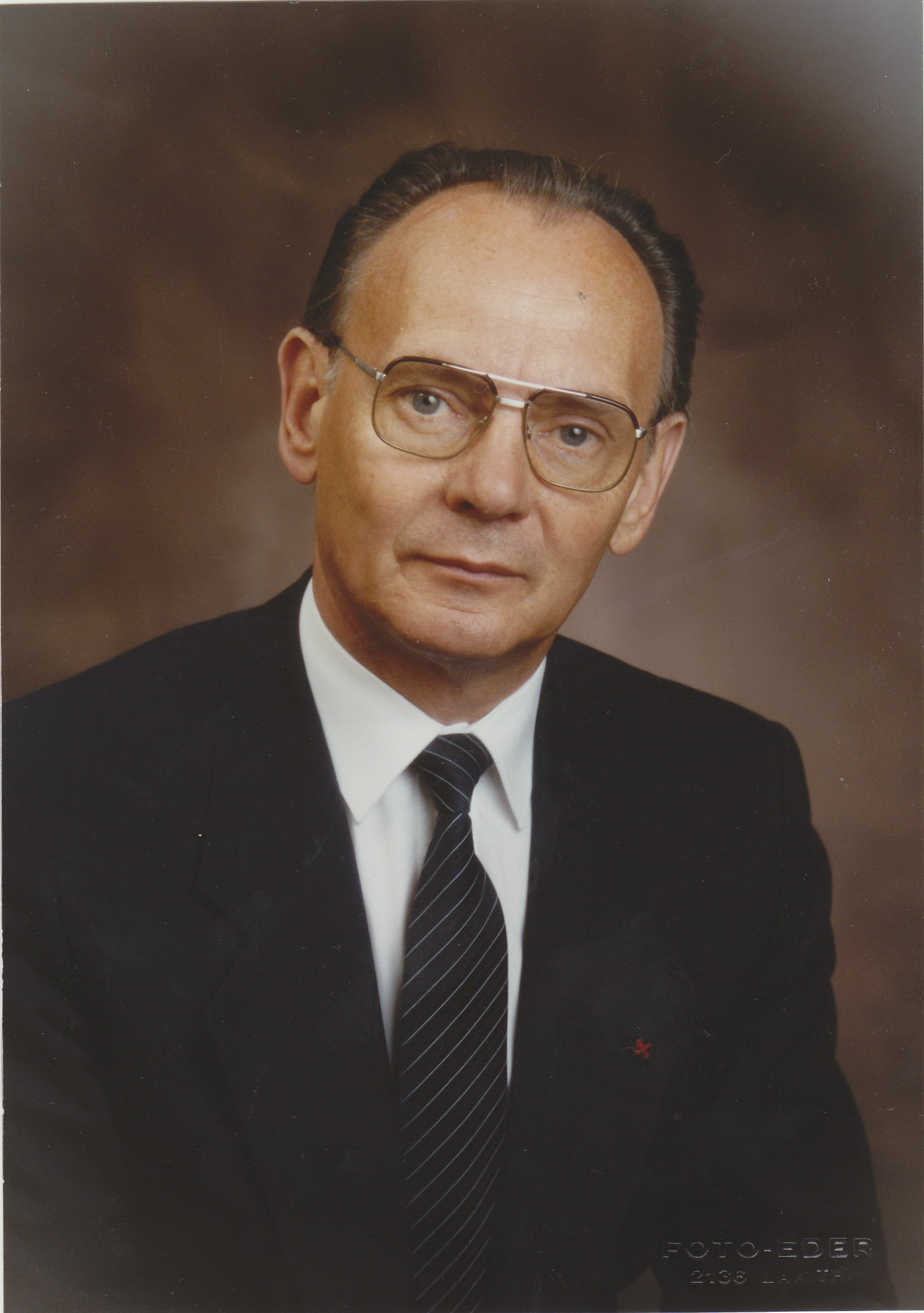 Der österreichische Chorleiter und Gründer der Chorvereinigung St. Augustin Friedrich Wolf